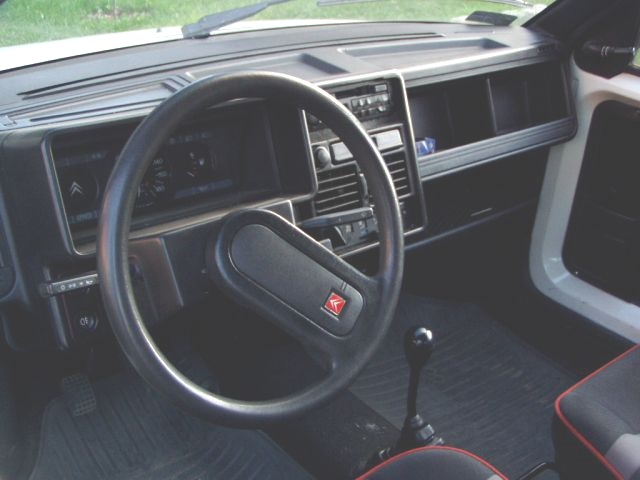 Deska rozdzielcza Citroena AX MK1